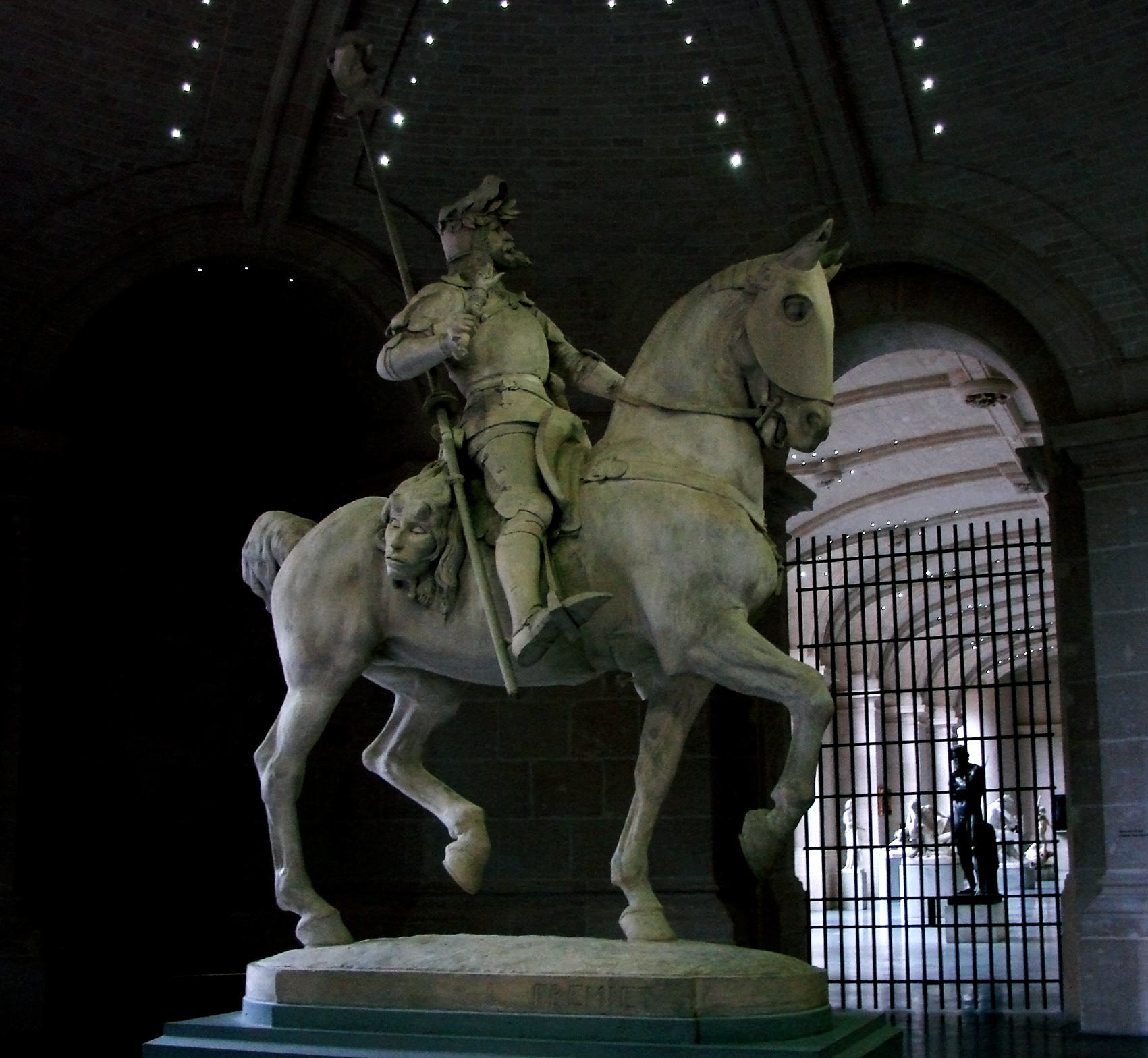 Le Chevalier errant, par Emmanuel Frémiet (Paris 24/12/1824 - Paris 11/09/1910). Musée des Beaux-Arts de Lille.